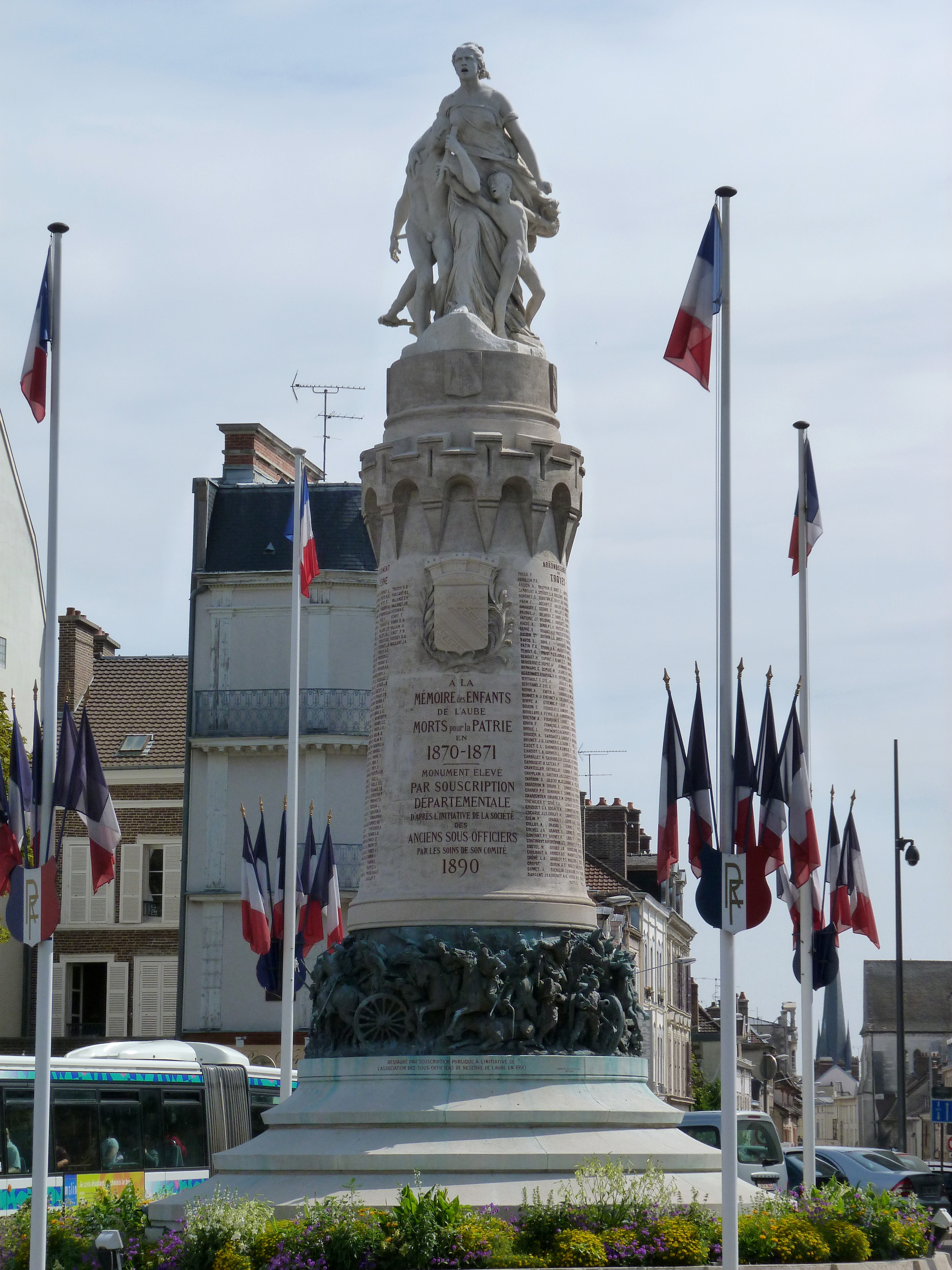 Monument aux morts de l'Aube à la guerre de 1870-1871-, Troyes (Aube), devant la gare. Le socle est cantoné d'un haut-relief circulaire en bronze par Désiré Briden (1850-1936), le groupe sommital est sculpté par Alfred Boucher (1850-1934).